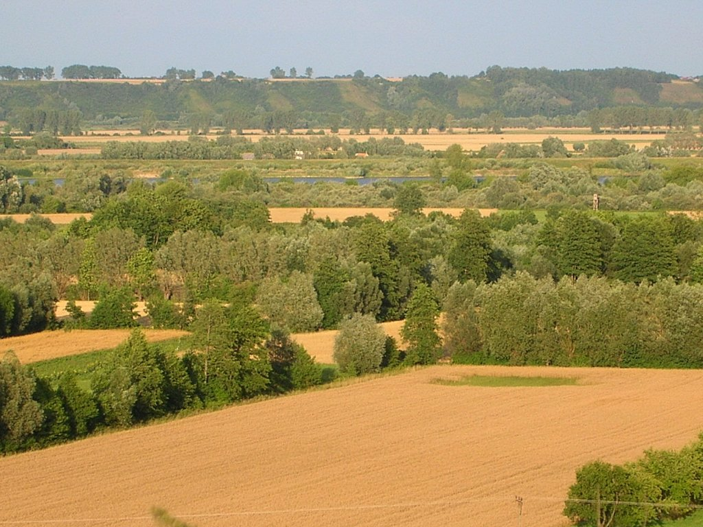 Widok z grodziska Talerzyk k. Gruczna na wschodnią krawędź Doliny Dolnej Wisły z rezerwatami "Płutowo" i "Zbocza Płutowskie"